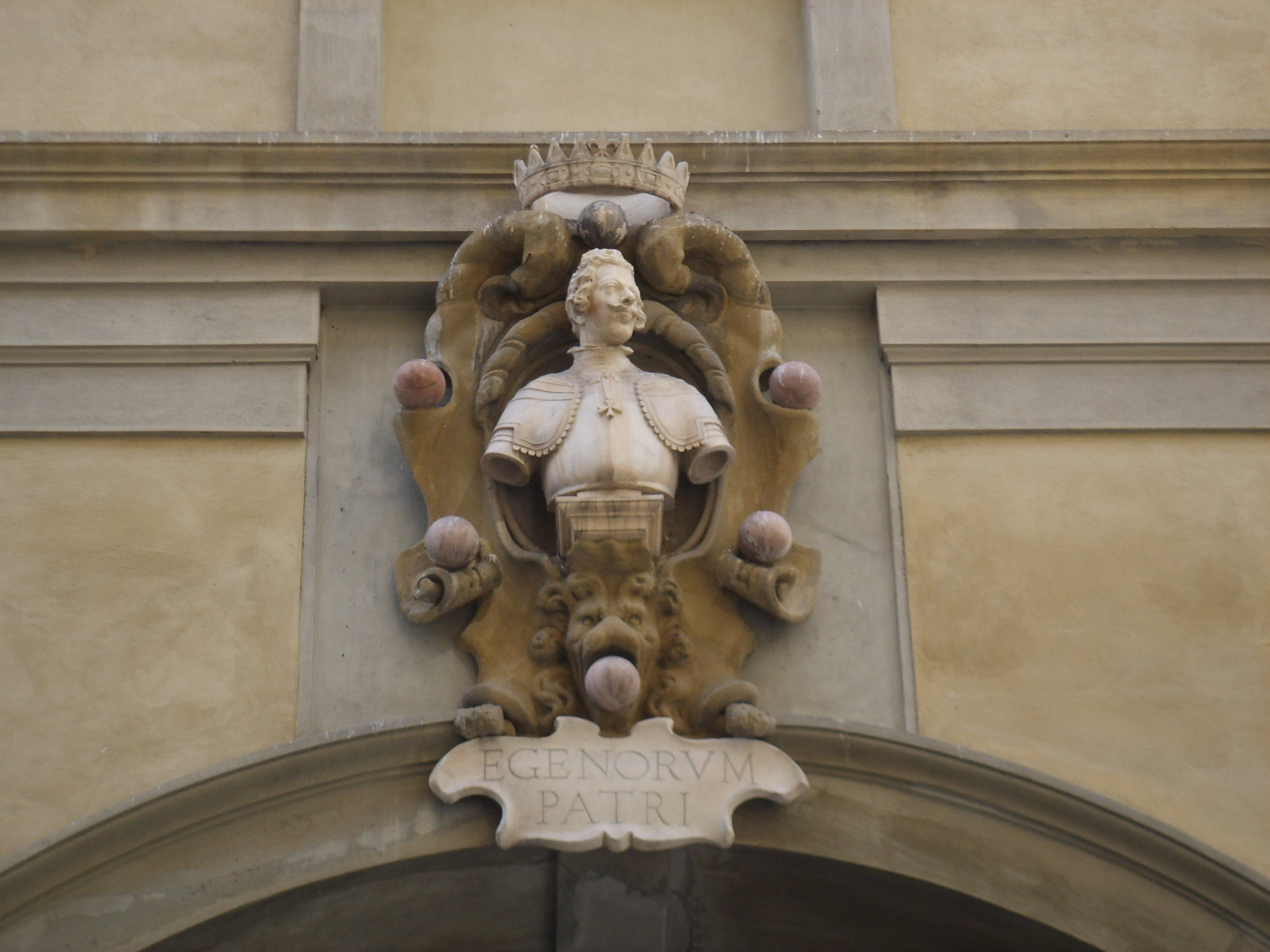 Cosimo II, loggia del Grano